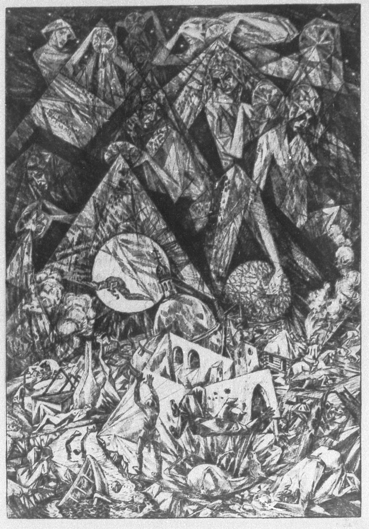 Die Ausgießung der sieben Schalen des Zorns, 1918, Worpswede, Heinrich-Vogeler-Archiv